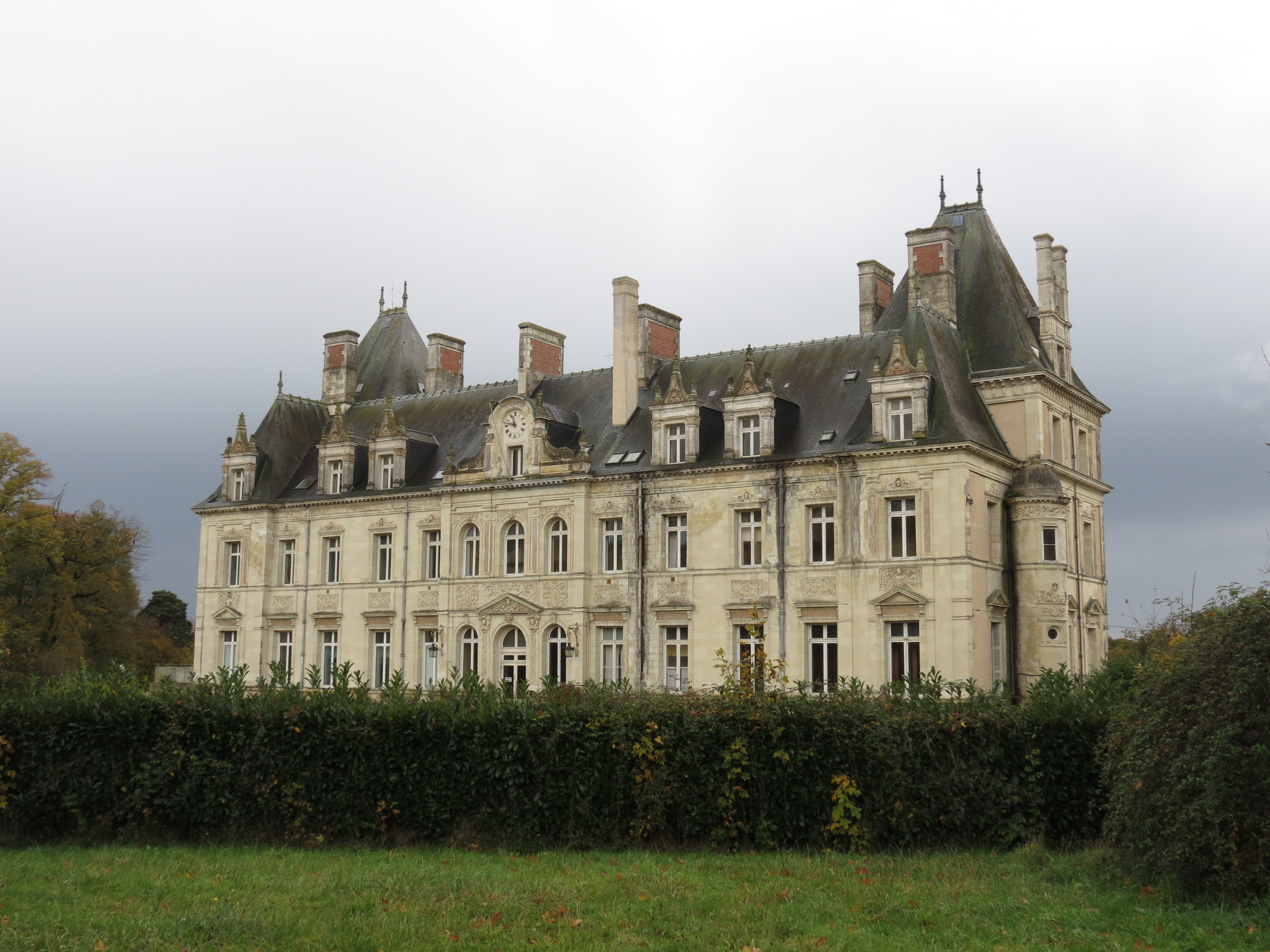 Pouancé - Tressé - Château